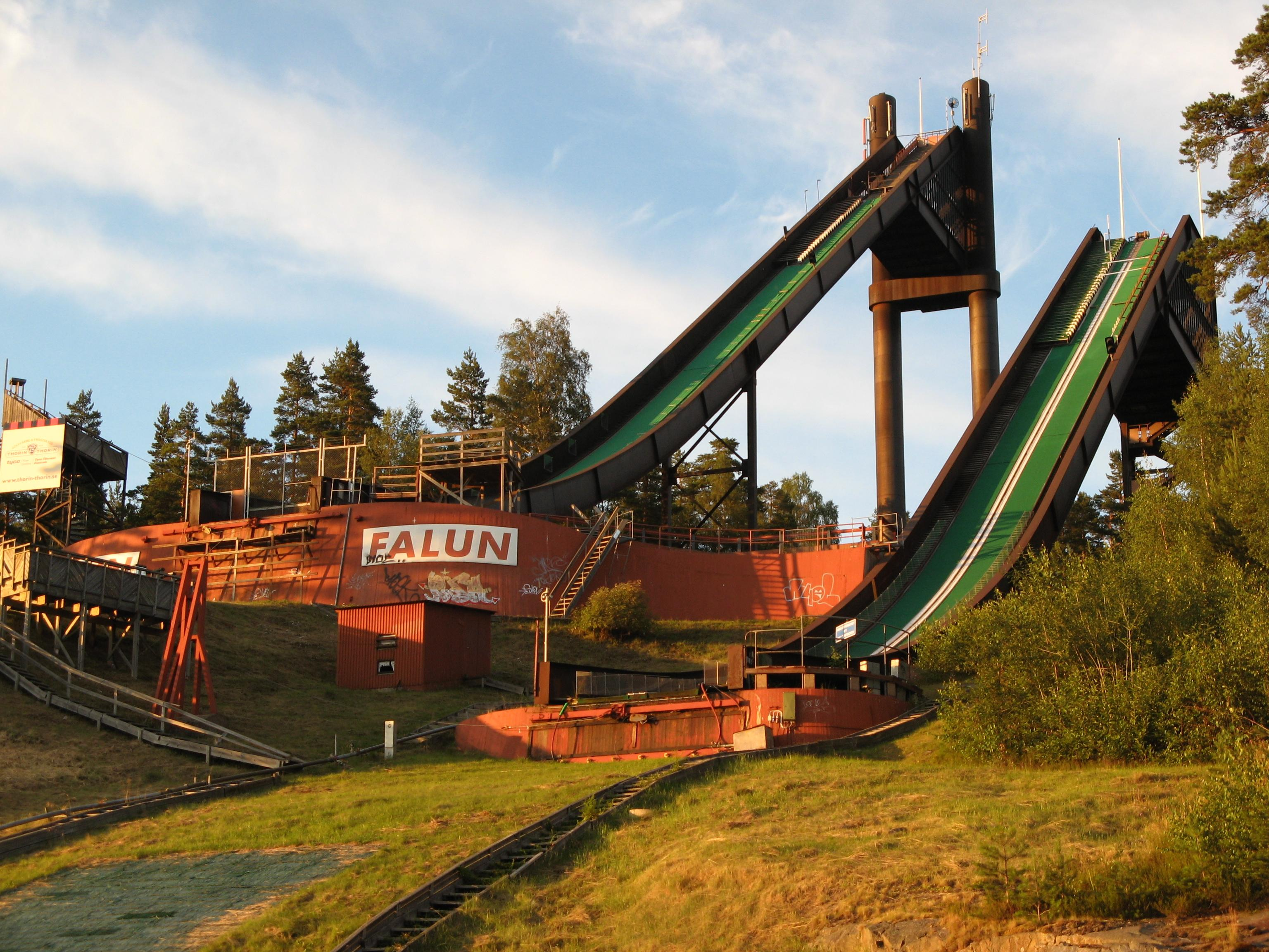 Ski jumping hill Lugnet in Falun, Sweden.Lugnet Ski-Jump